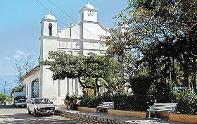 Imagen del Centro de Trinidad, Gerardo Paredes.